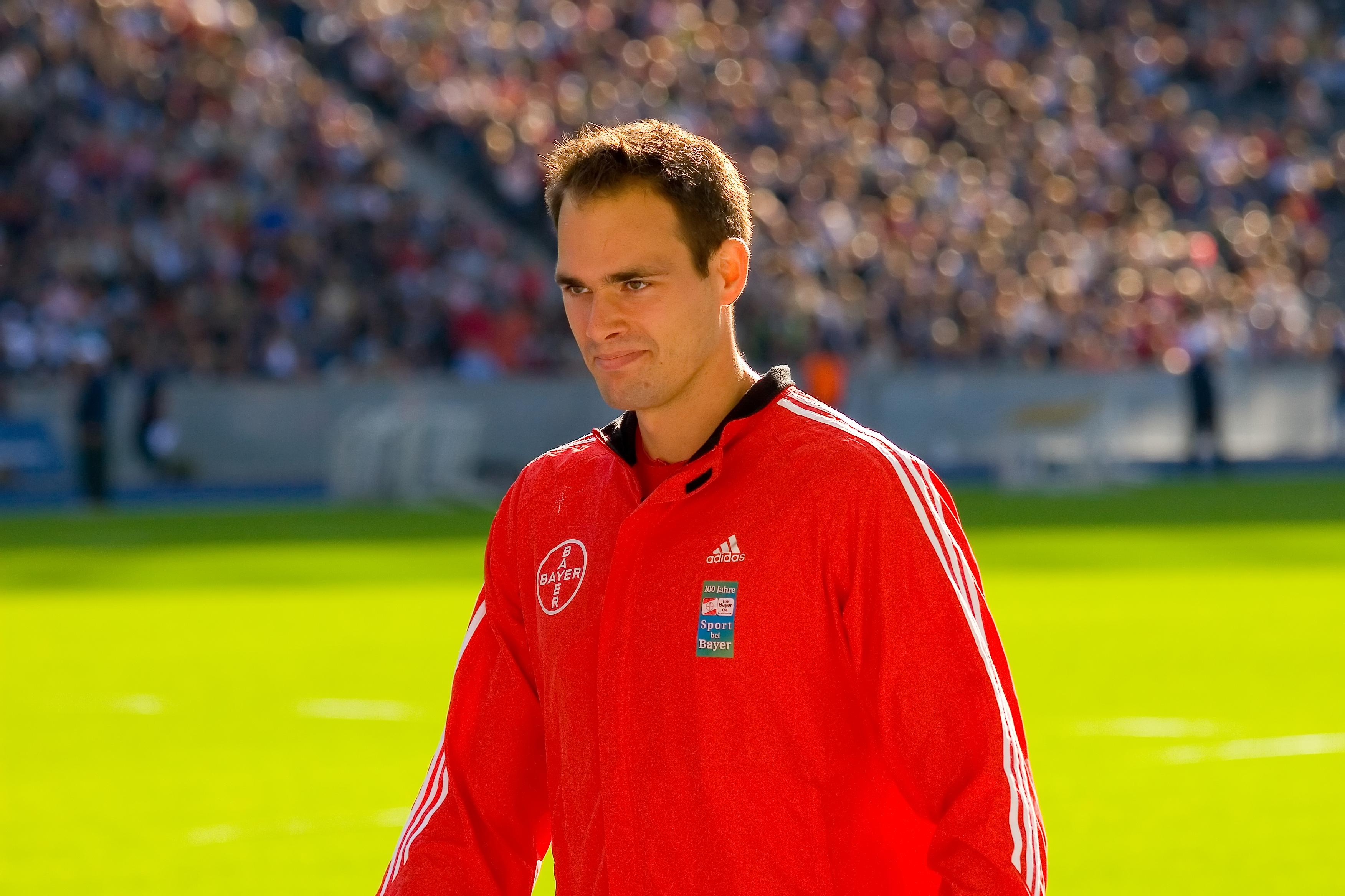 Ingo Schultz Istaf Berlin